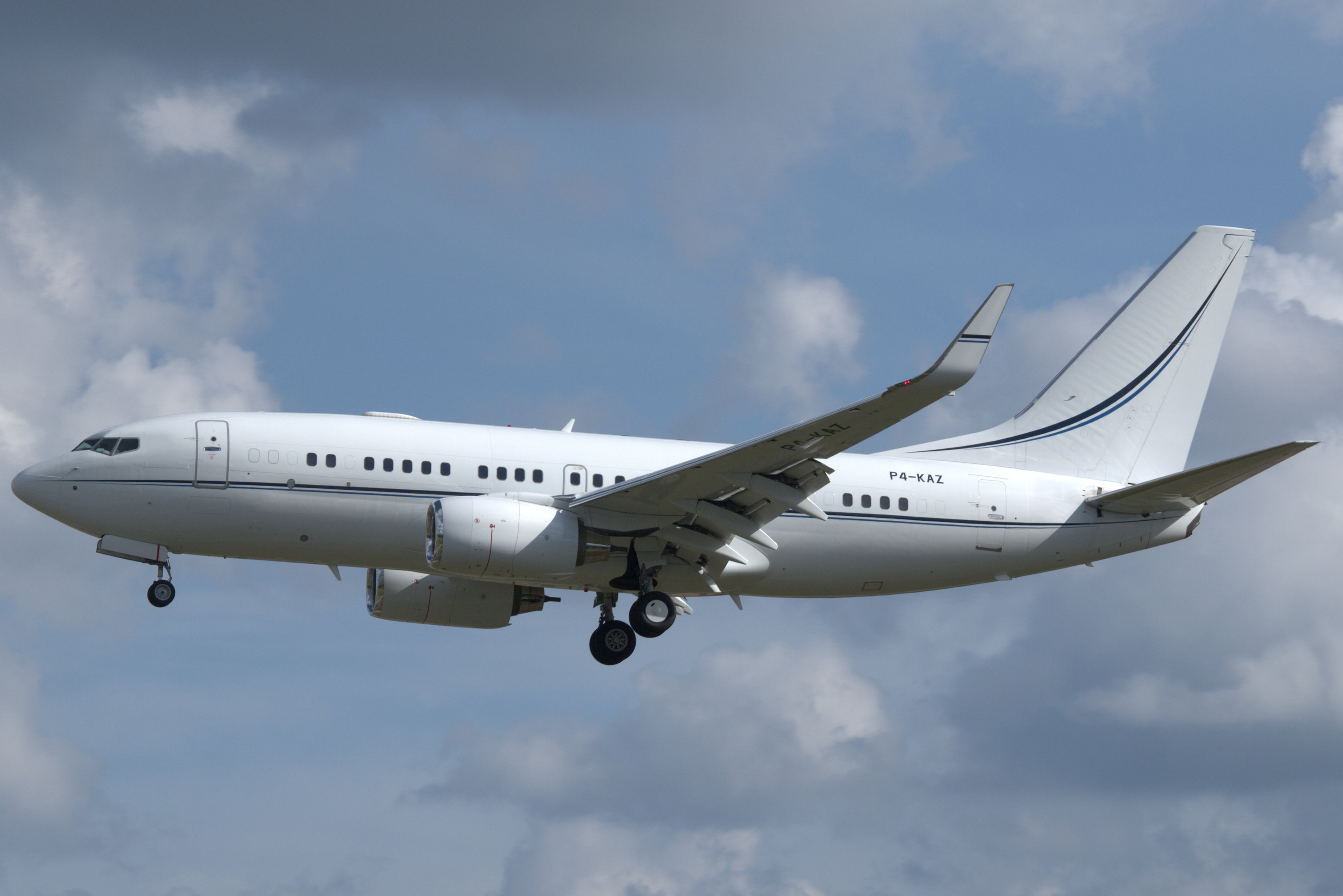 GVA 25.08.2013